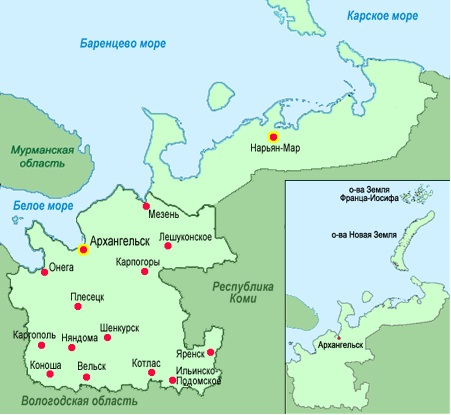 Зона ответственности АОСС